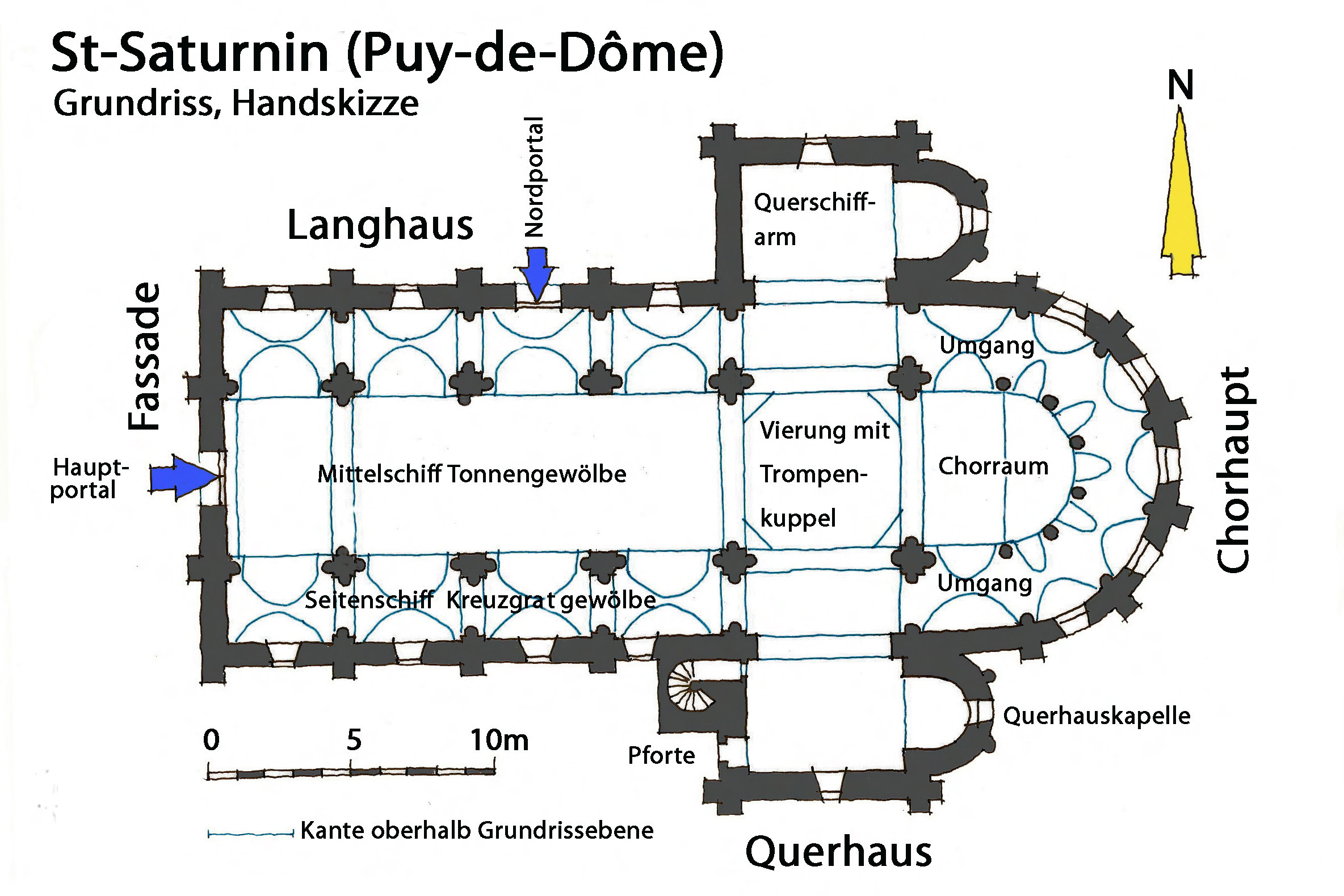 St-Saturnin (Puy-de-Dôme), Grundriss, Handskizze